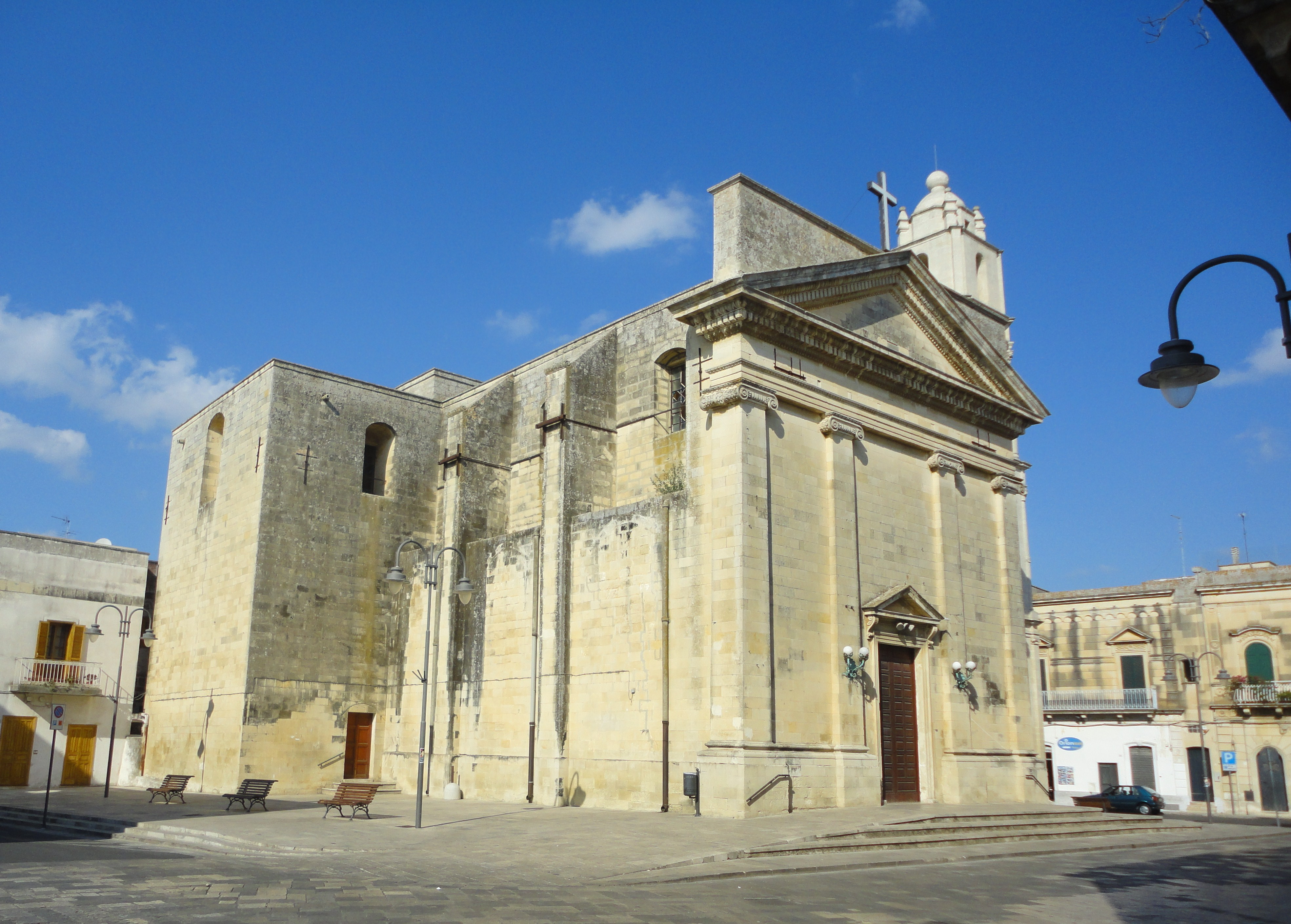 Chiesa madre di Cursi, Lecce